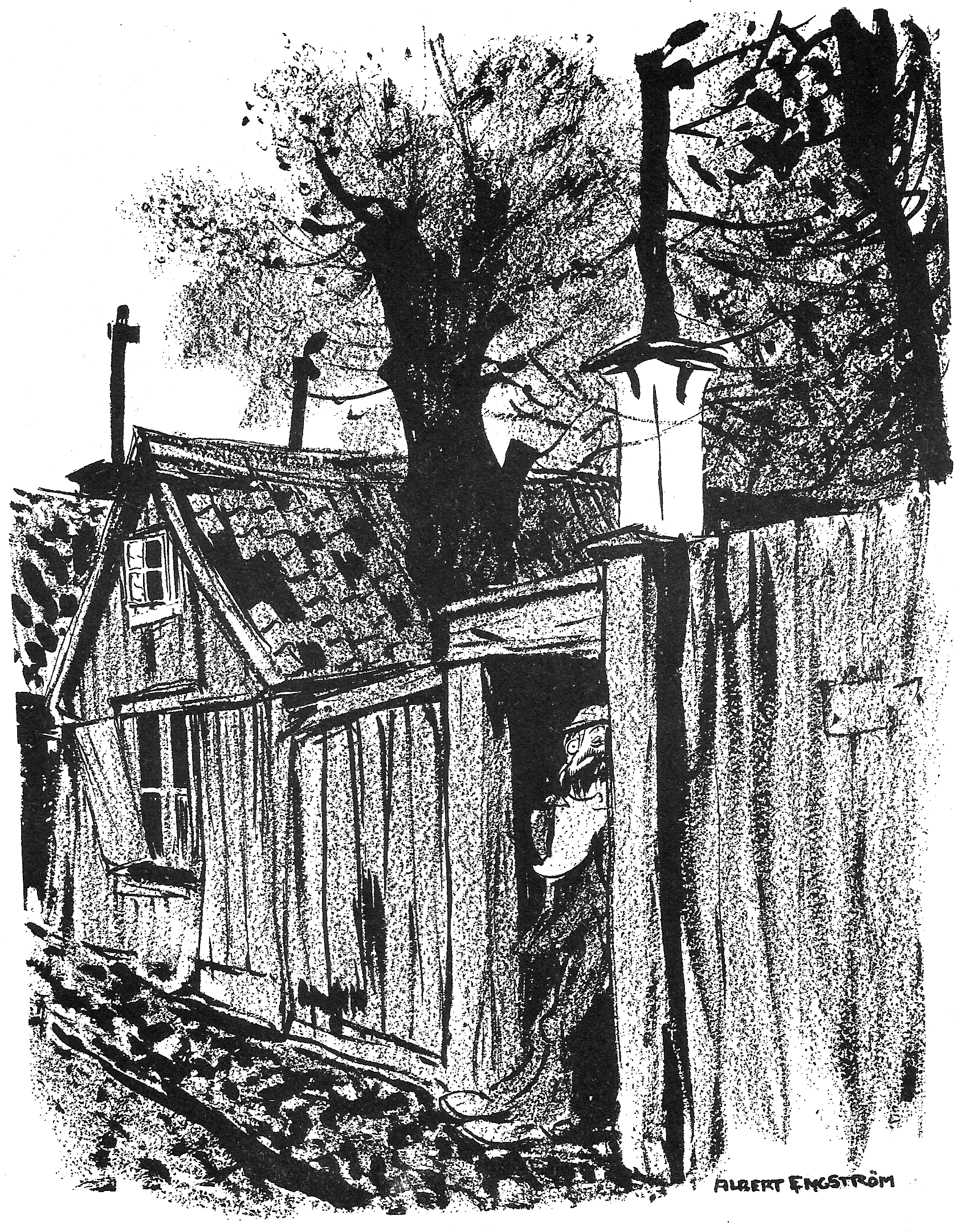 "Jag ber eder följa med till Söder i Stockholm, till Åsögatan, där Kolingen har sin enkla lya. Ni ser hur han står i porten till det wigwam, där han logerar hos Fula Filip, vilken i sin ordning innebor hos Feta Fille..."